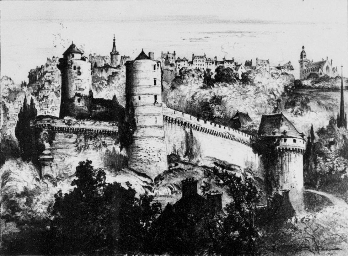 Le château de Fougères vers 1900 (lithographie d'Albert Robida publiée dans "La vieille France, Bretagne" vers 1900. De gauche à droite: poterne d'Amboise, tour du Gobelin, tour Mélusine et tour Surienne.)